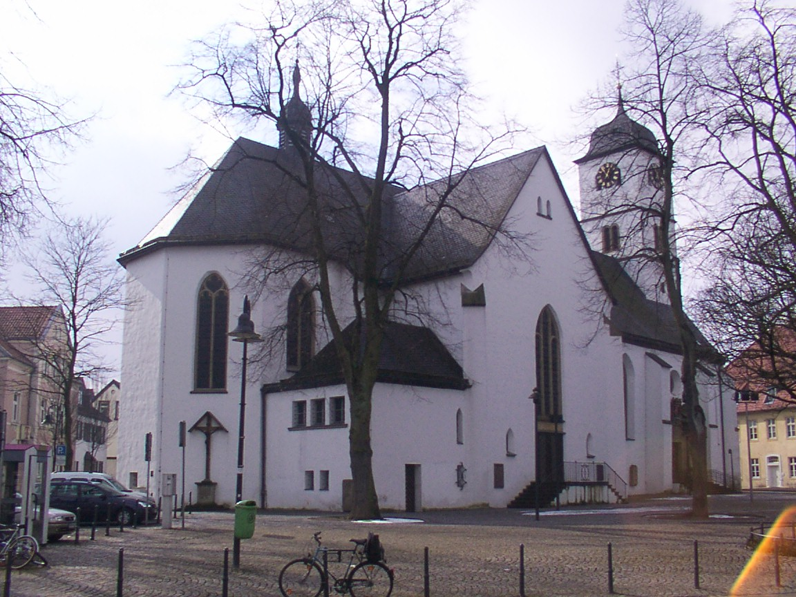 Paderborn: Katholische Kirche Sankt Heinrich und Kunigunde in Schloß Neuhaus